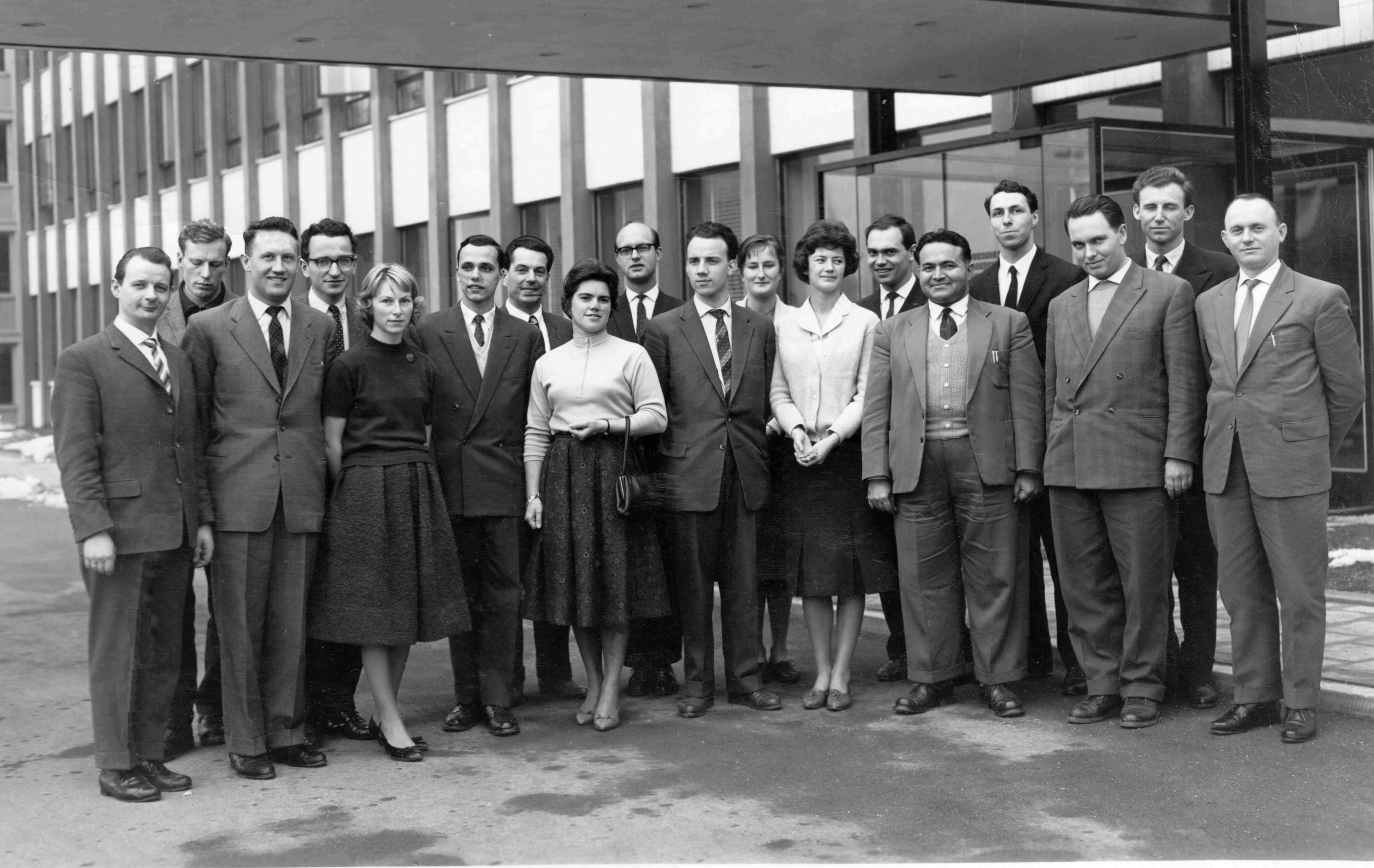 Mitarbeiter des Instituts für Praktische Mathematik (Darmstadt), Ende Januar 1960 vor den Siemenswerken in München. Von links nach rechts: ?, von Peschke, Kraus, von Falkenhausen, Maniel, Schnell, Schmitten, Krimm, Prause, Börsch-Supan, Geist, Diefenbach, Rein, Kapur, Neumann, Roth, Masnikora, ?